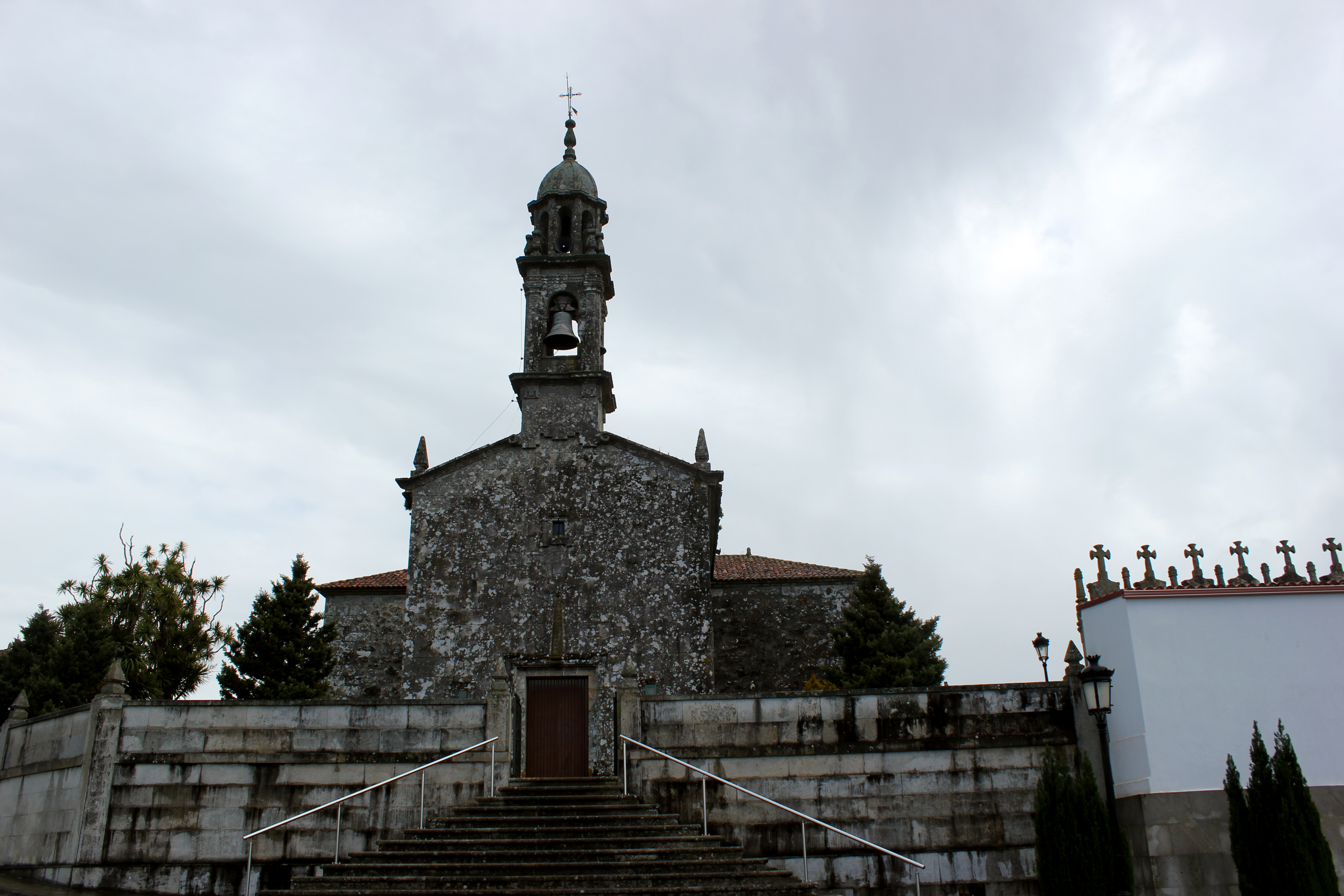 Iglesia de Sergude, Boqueixón.